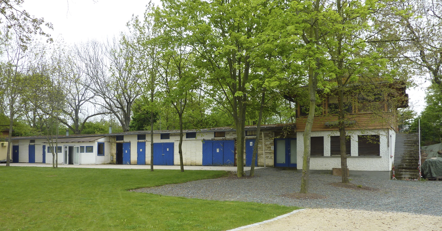 Frankfurt am Main, Stadtteil Niederrad: Das Licht- und Luftbad Niederrad ist eine städtische Grünanlage auf einer schmalen Landzunge am südlichen Mainufer. Das Foto zeigt die erhalten gebliebenen Funktionsgebäude – mit Umkleideräumen, Duschen und Aussichtsraum der Lebensrettung – des bis in die 1950er-Jahre an selber Stelle unter gleichem Namen betriebenen Flussschwimmbads